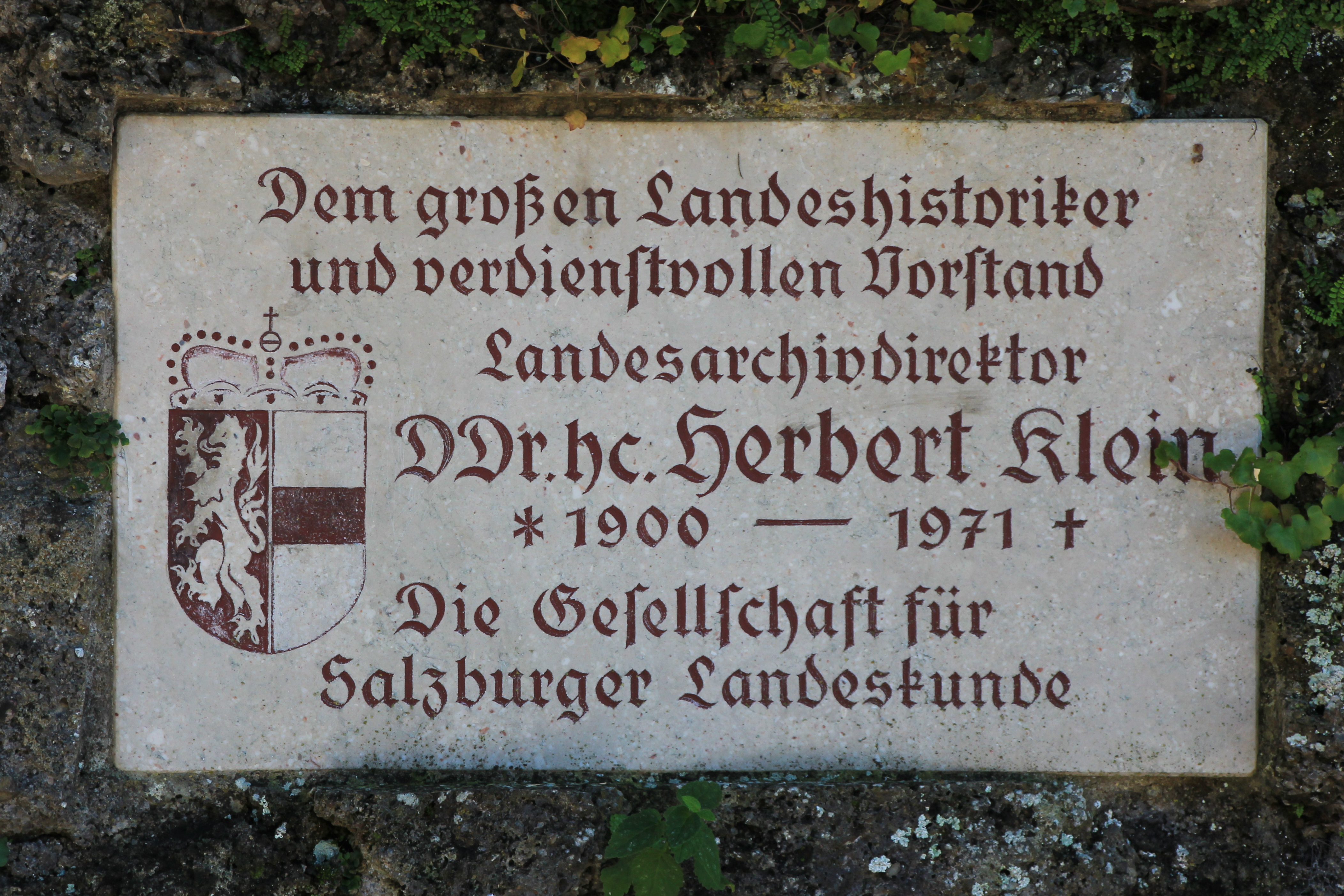 Gedenktafel an den Landesarchivar Herbert Klein am Weg auf den Mönchsberg